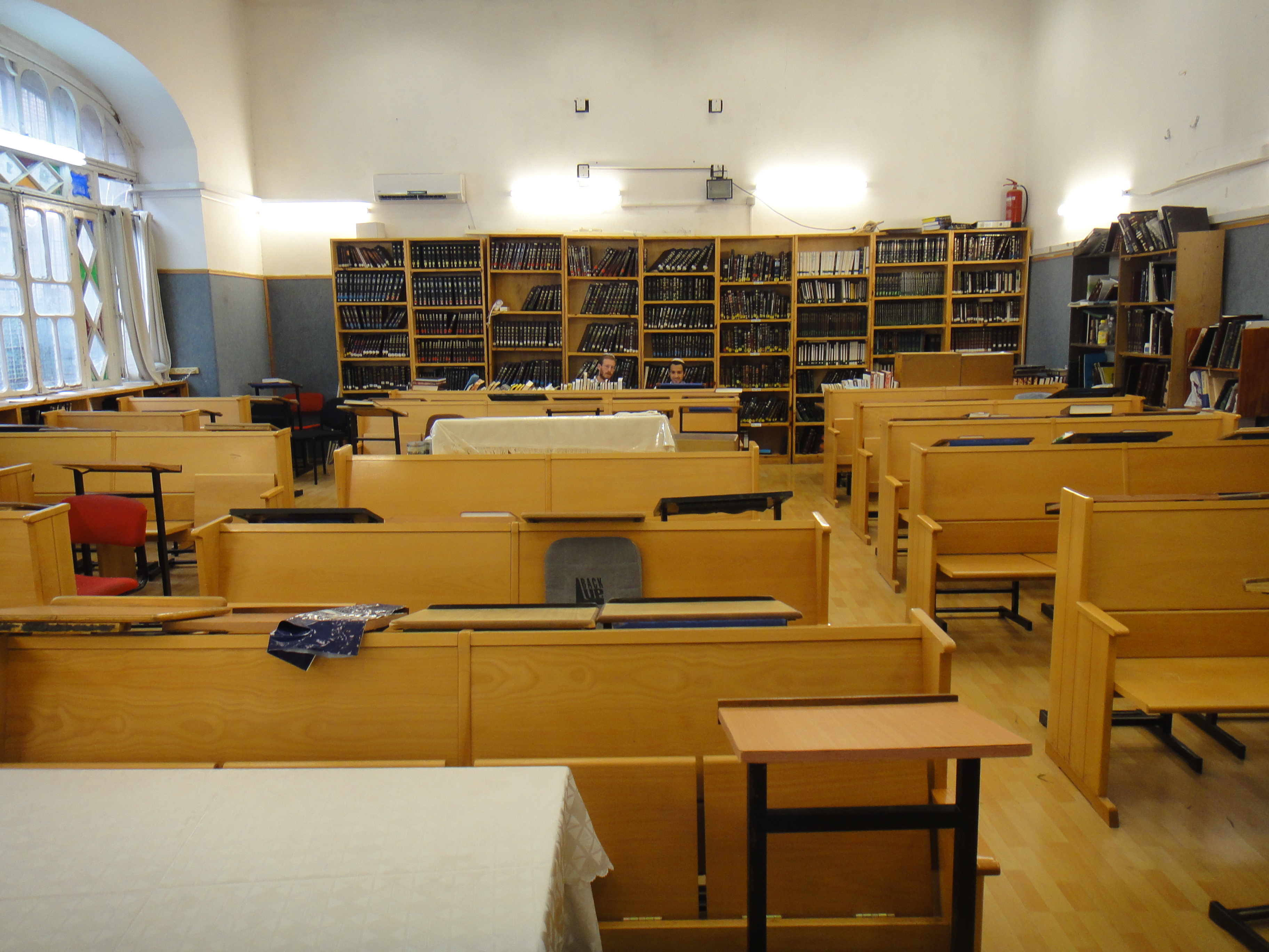 נאות דוד